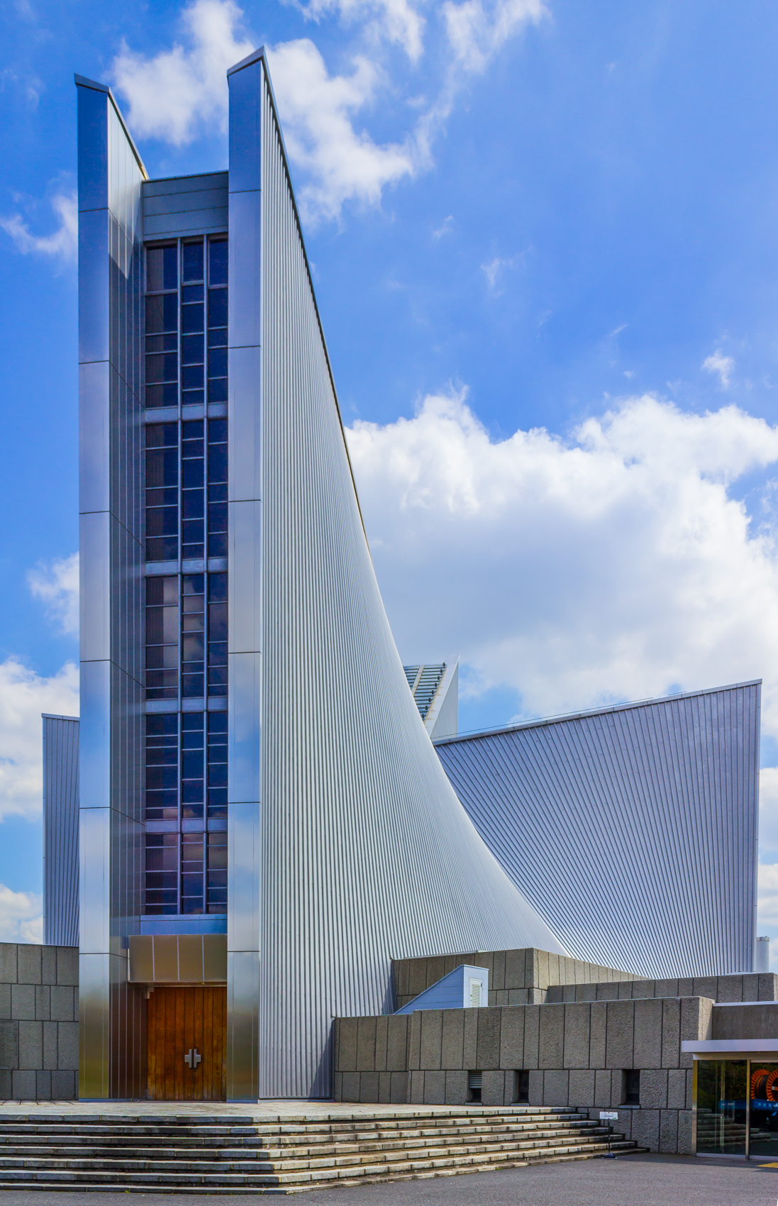 東京カテドラル聖マリア大聖堂（東京都文京区）、 Tange Kenzo.